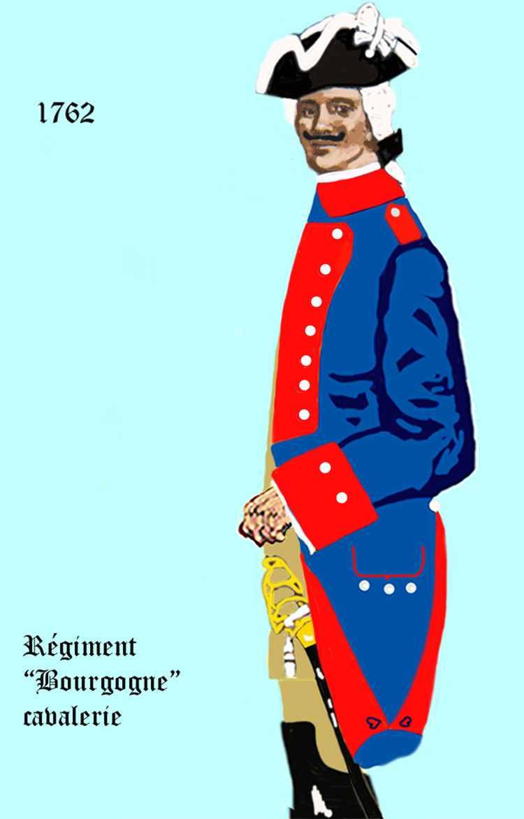 Uniforme d' un régiment de cavalerie française de 1762 à 1767